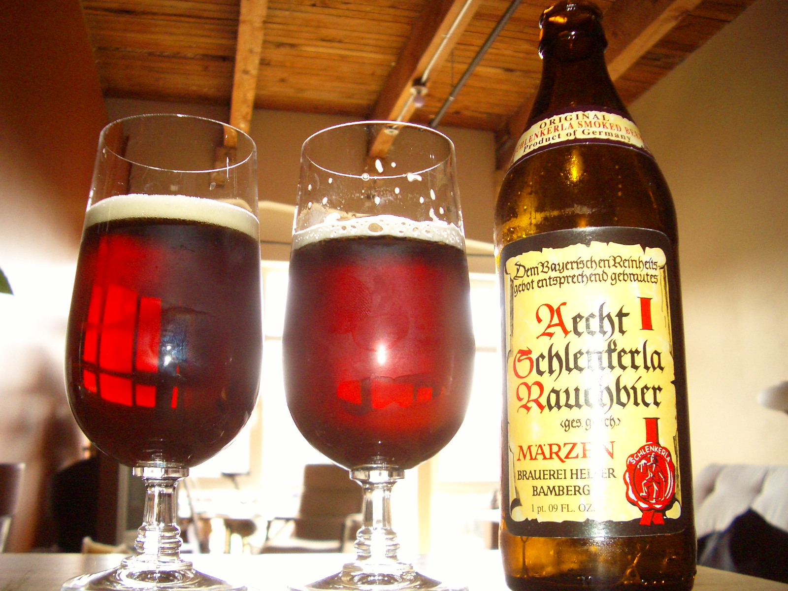 BeerSmoked Beer Tastes Like Slim Jim